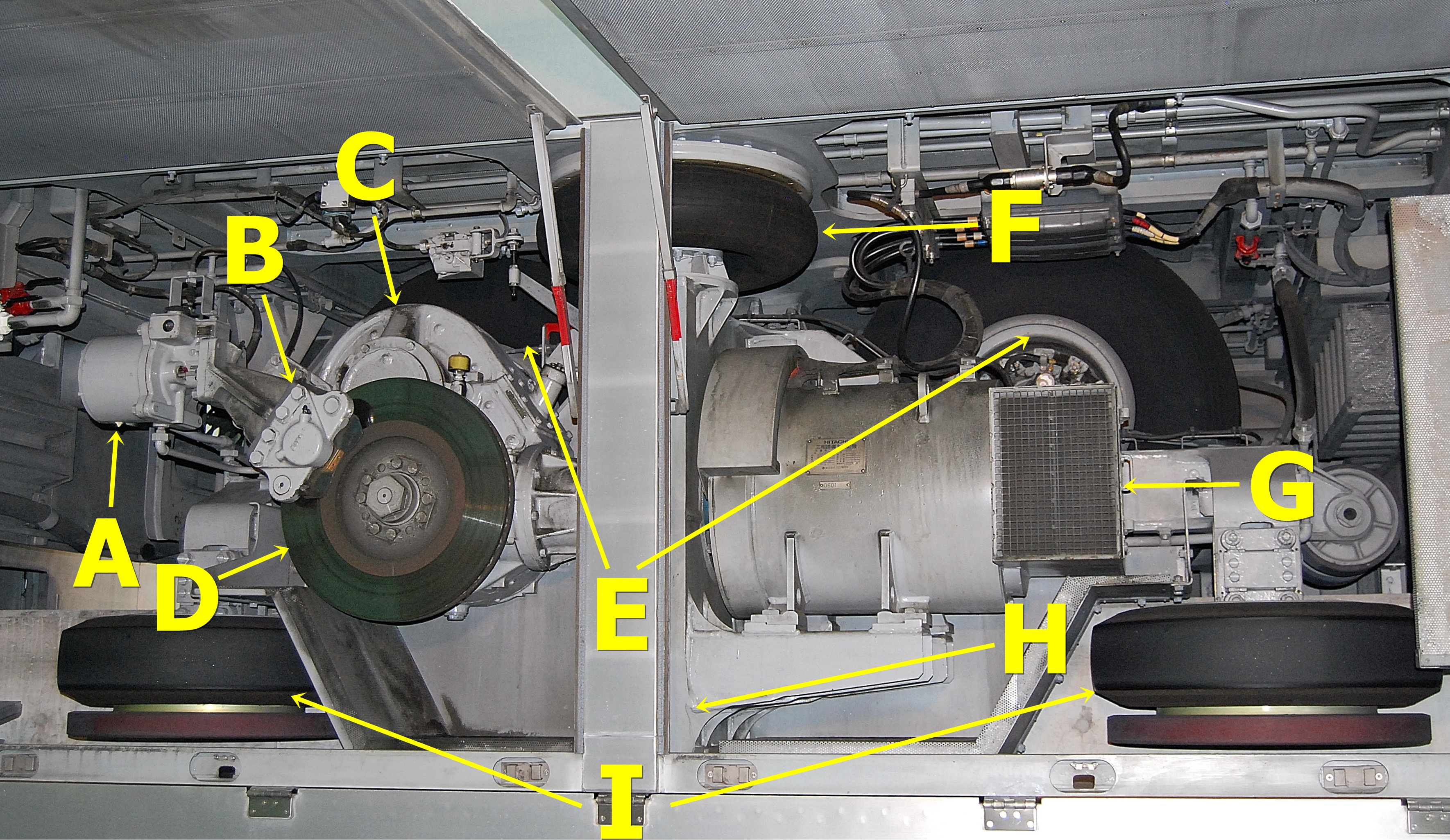 多摩都市モノレール1000系電車の日本跨座式の動力台車、2軸ボギーボルスタレス台車となっており、駆動装置とモーターを台車枠の横に直接取付け、その間をTD継手と中間軸を介して結合されている2段減速直角カルダン方式である。基礎ブレーキは、中間軸にディスクブレーキを設けライニング制輪子によりブレーキを掛ける空油変換式ディスクブレーキ方式である。Aは空油変換器・Bはライニング制輪子・Cは駆動装置・Dはブレーキディスク・Eが走行輪・Fが空気バネ・Gがモーター・Hが安定輪に伸びる台車枠のアーム（下に安定輪がある）・Iが案内輪。（多摩モノまつり2012での車両基地見学会にて撮影）